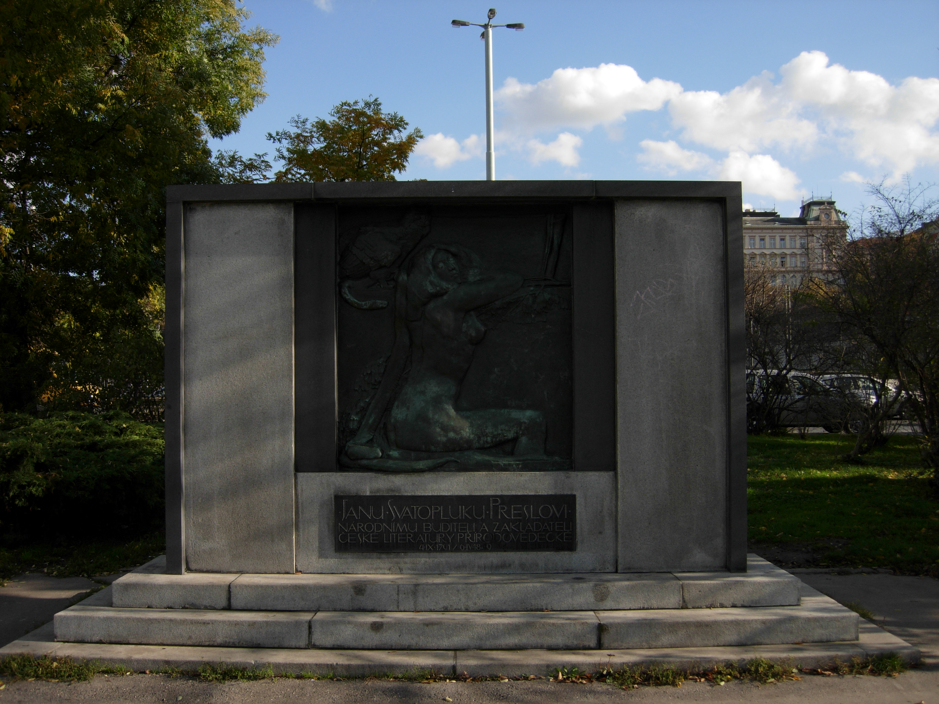 Pomník Jana Svatopluka Presla, Praha 1, Vrchlického sady